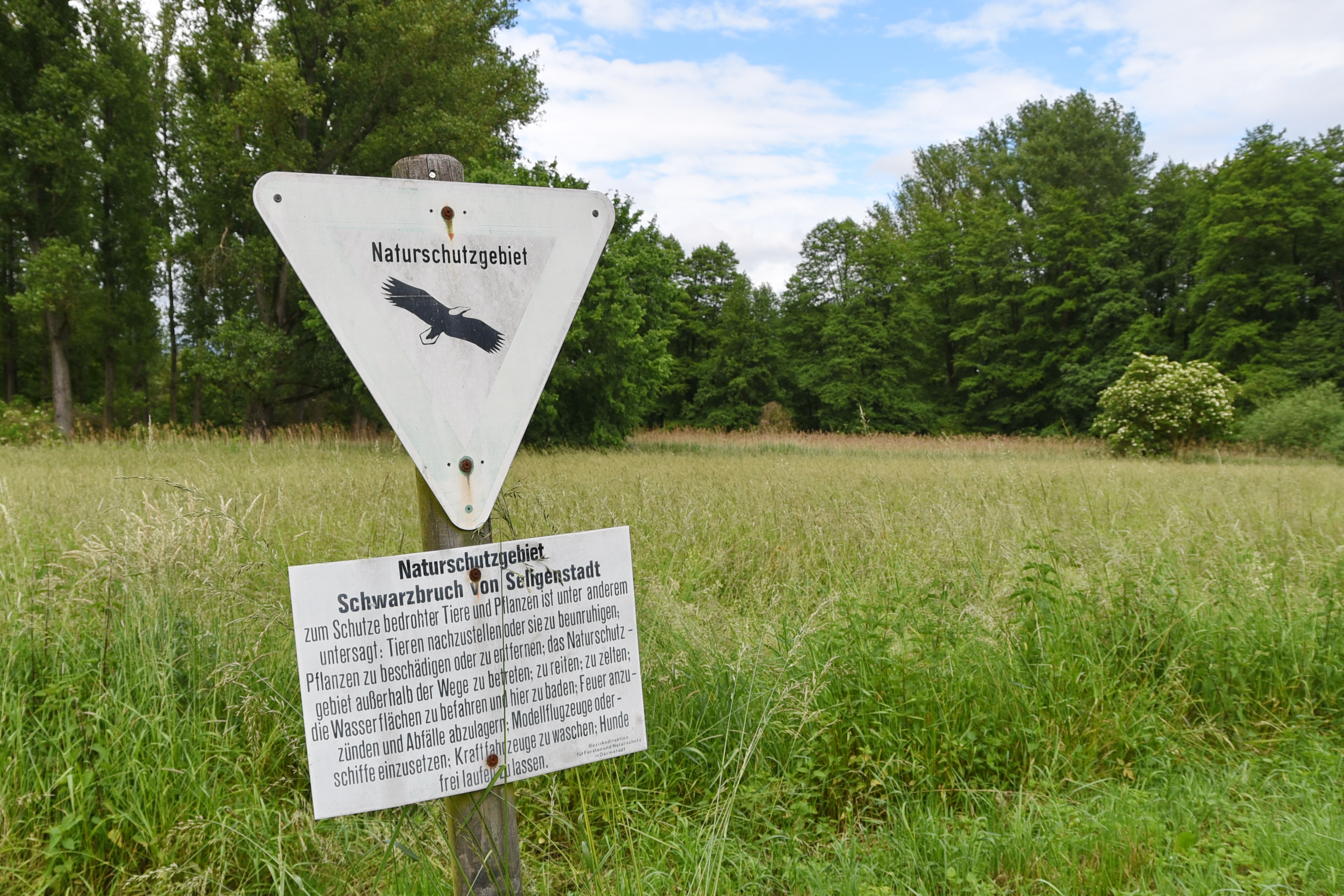 Das NSG Schwarzbruch von Seligenstadt liegt im Westen von Seligenstadt zwischen der Landesstraße L2310 und dem Harresseeim Naturraum östliche Untermainebene.